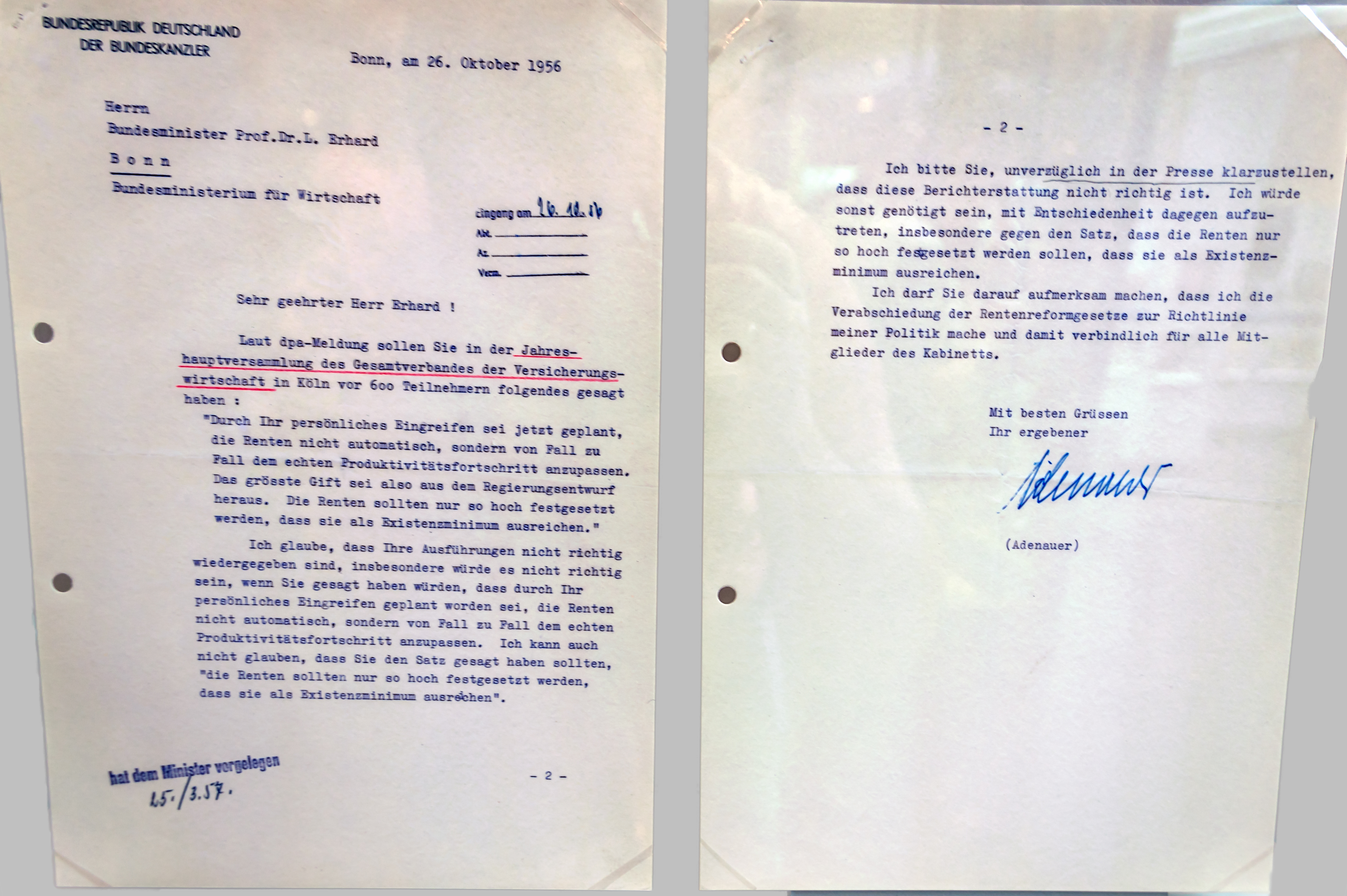 Bundeskanzler Konrad Adenauer zeigt mit dem Schreiben vom 26. Oktober 1956 gegenüber dem Bundeswirtschaftsminister Ludwig Erhard an, dass er in der anstehenden Rentenformgesetzgebung von seiner Richtlinienkompetenz Gebrauch macht